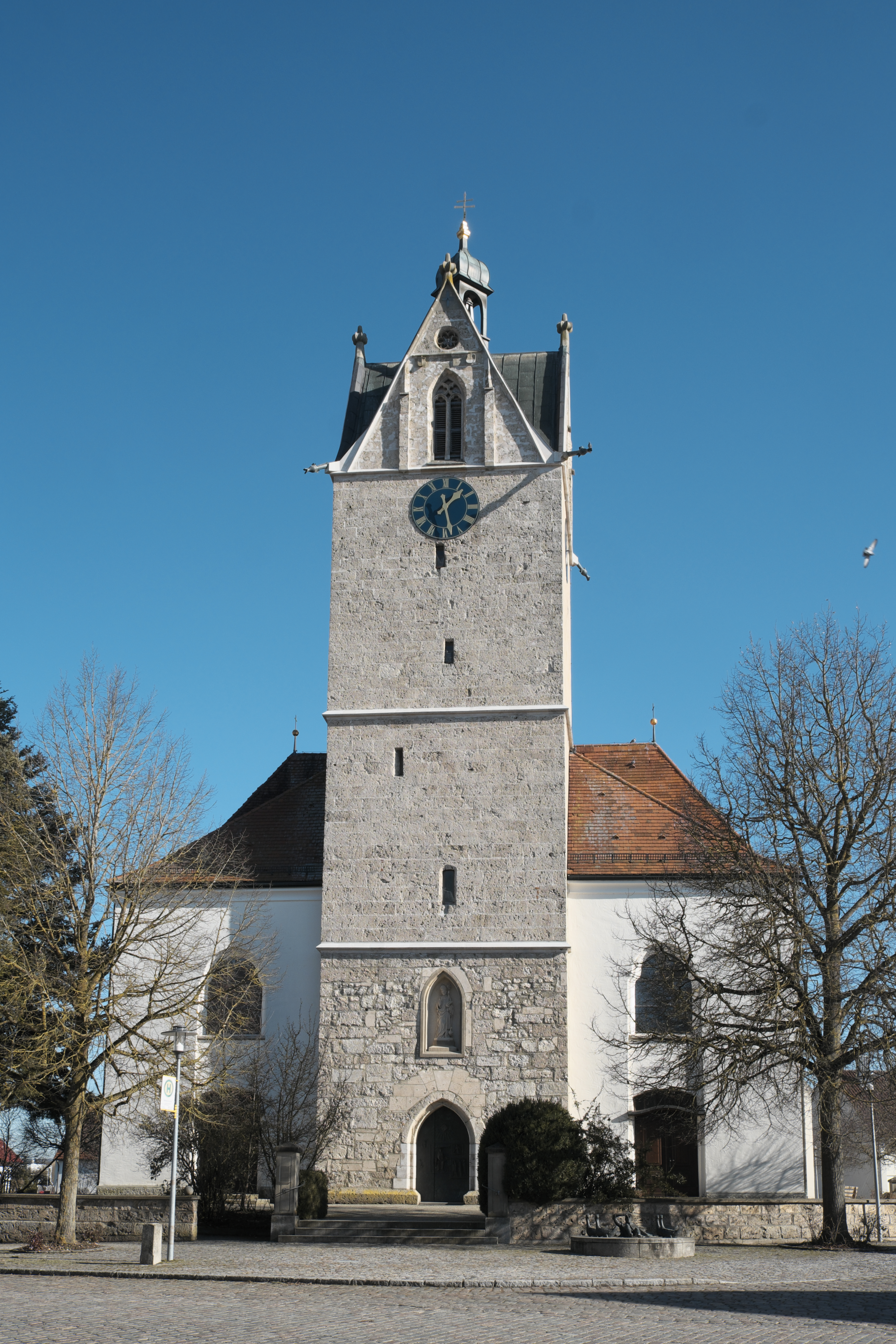 Katholische Pfarrkirche St. Martin in Altheim (bei Riedlingen) im Landkreis Biberach (Baden-Württemberg/Deutschland)